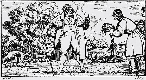 «Дубровский». Троекуров на псарне.jpg